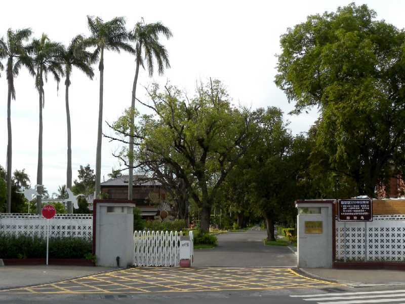 臺南麻豆糖廠大門。